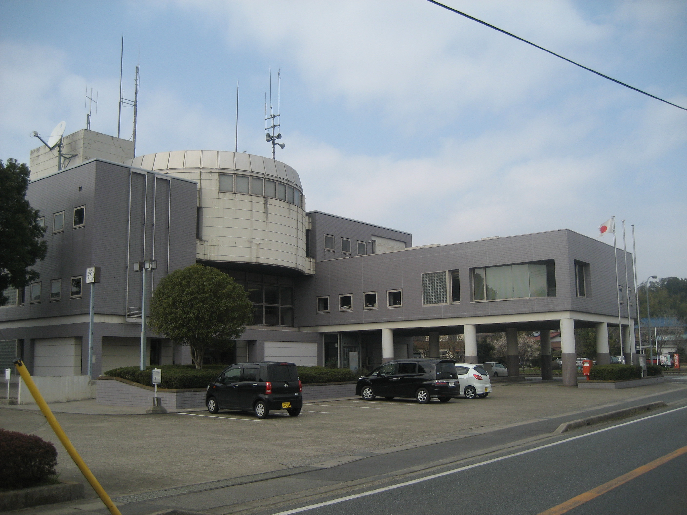 千葉県印旛郡本埜村役場庁舎